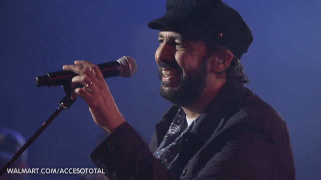 No te pierdas una presentacion exclusiva con Juan Luis Guerra en Acceso Total. Visita